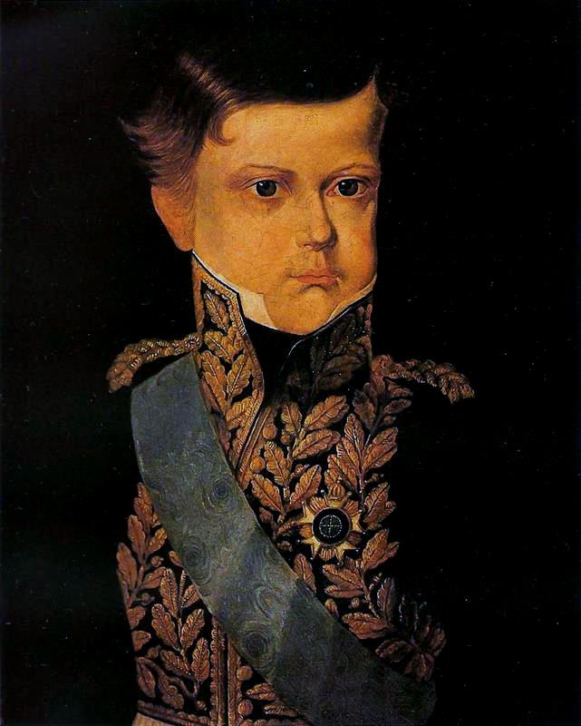 Retrato de Dom Pedro II